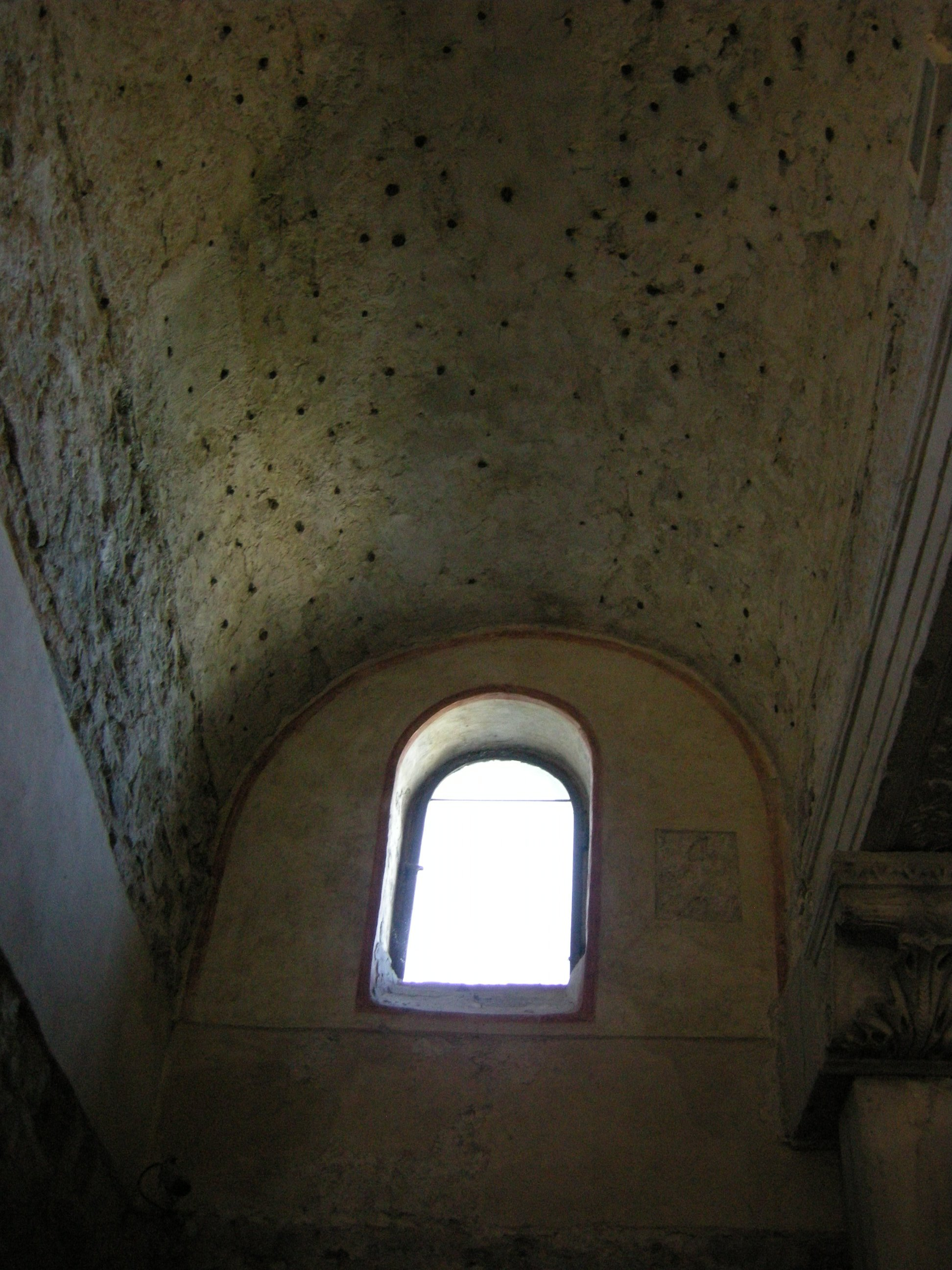 Cividale, tempietto longobardo, affreschi